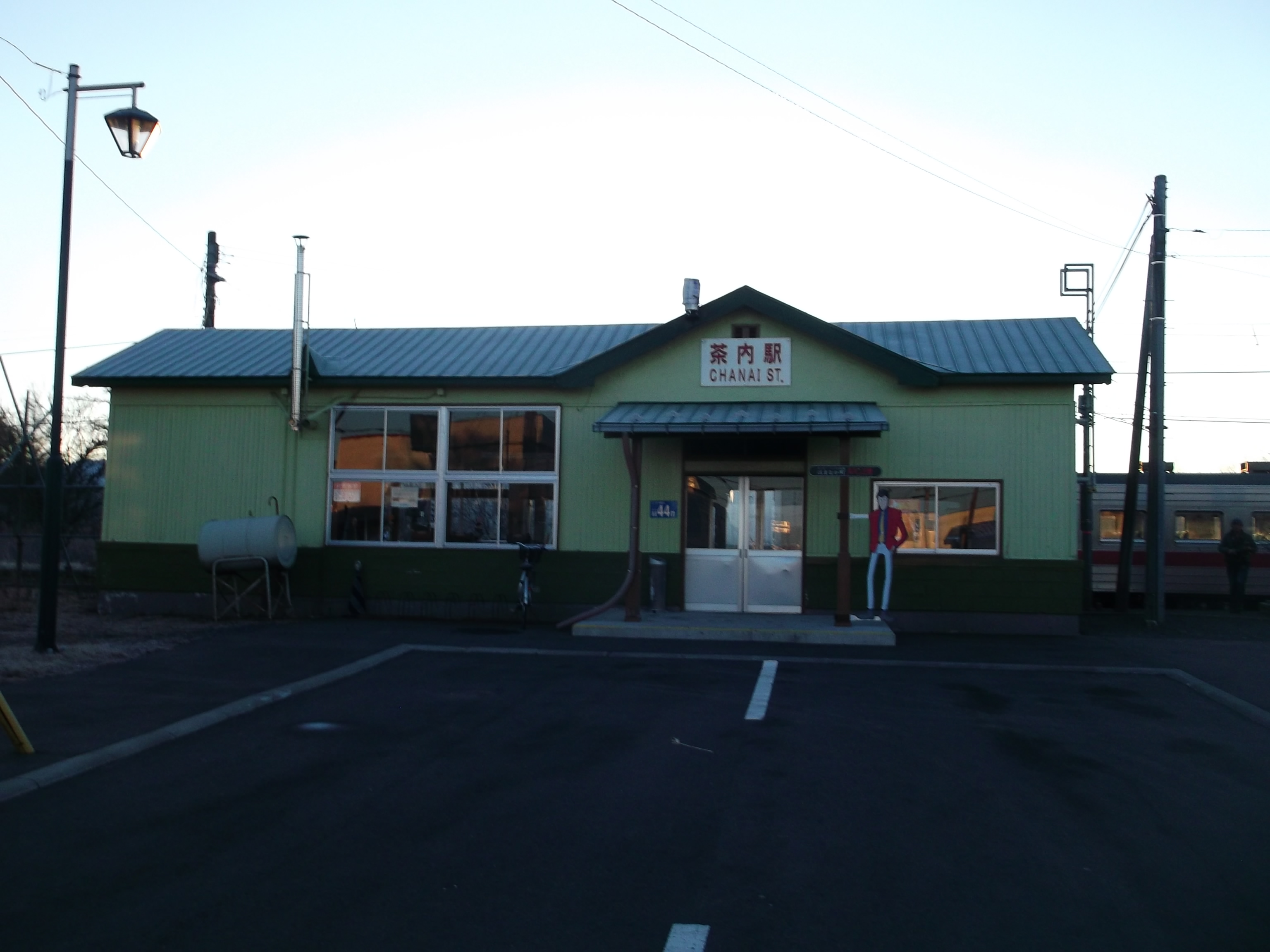 ＪＲ根室本線 茶内駅